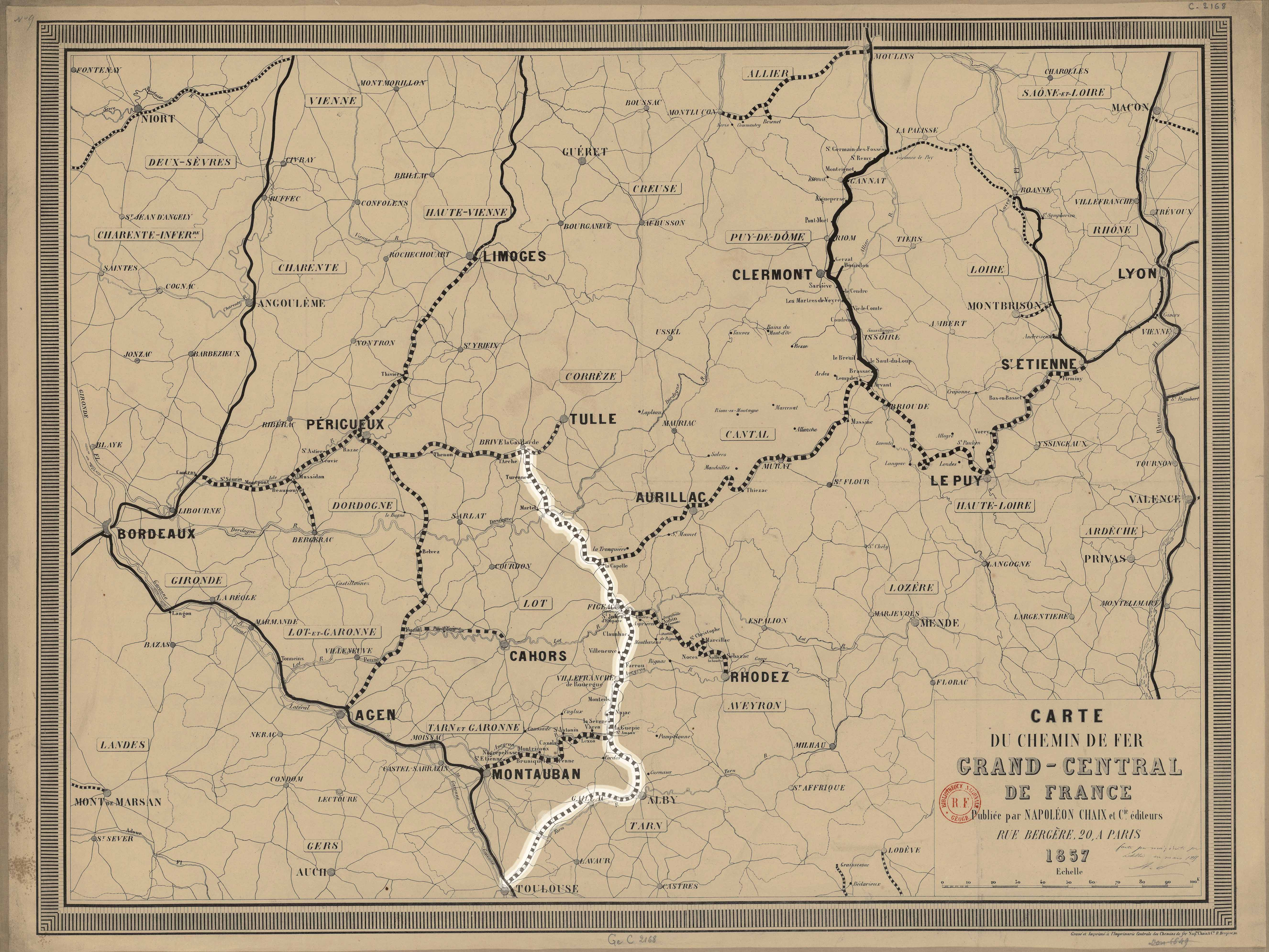 Carte du chemin de fer grand-central de France - Imprimerie Napoléon Chaix - 1857